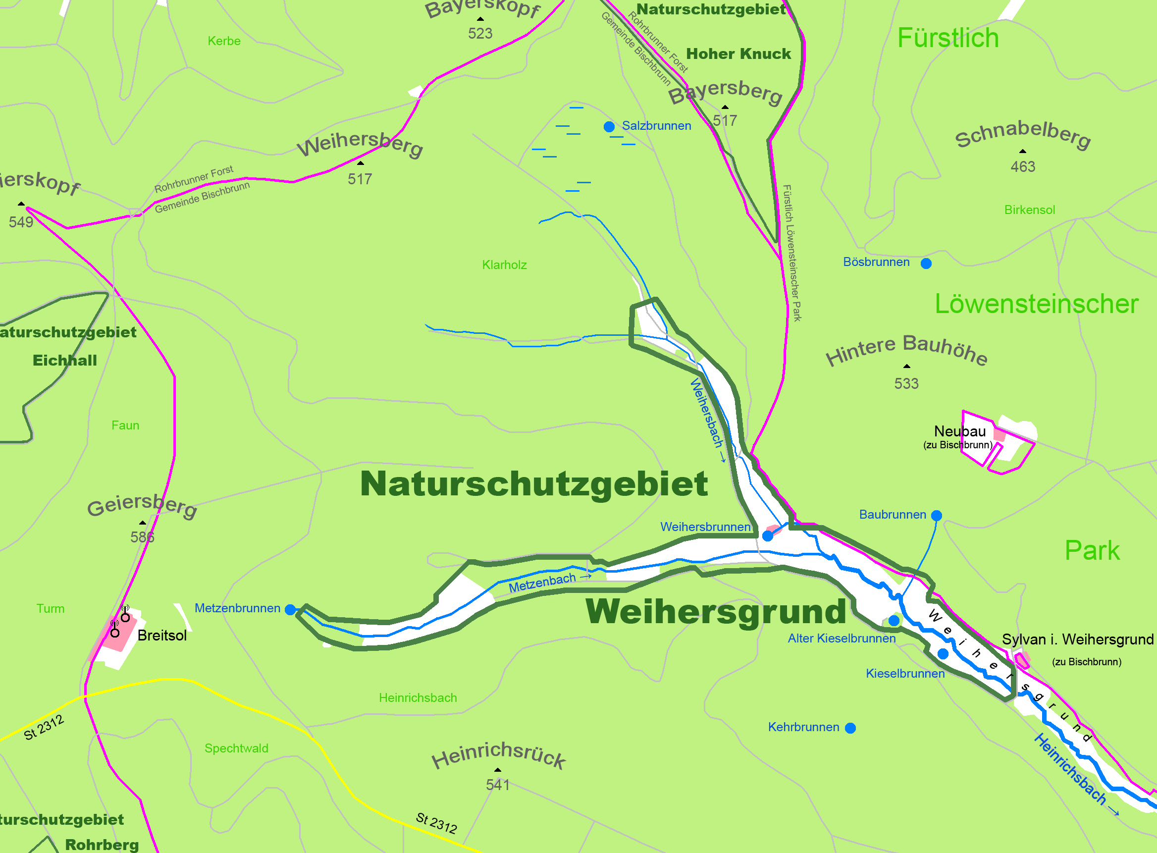 Karte des Naturschutzgebietes Weihersgrund bei Bischbrunn, Bayern Siedlungsfläche Grünfläche, Wiesen Wald Gewässer Moor Berg 586 Höhe über Normalhöhennull Sendemast Hauptstraße Feld- und Waldwege Naturschutzgebietsgrenze Gemeindegrenze Fink Flurname Quelle